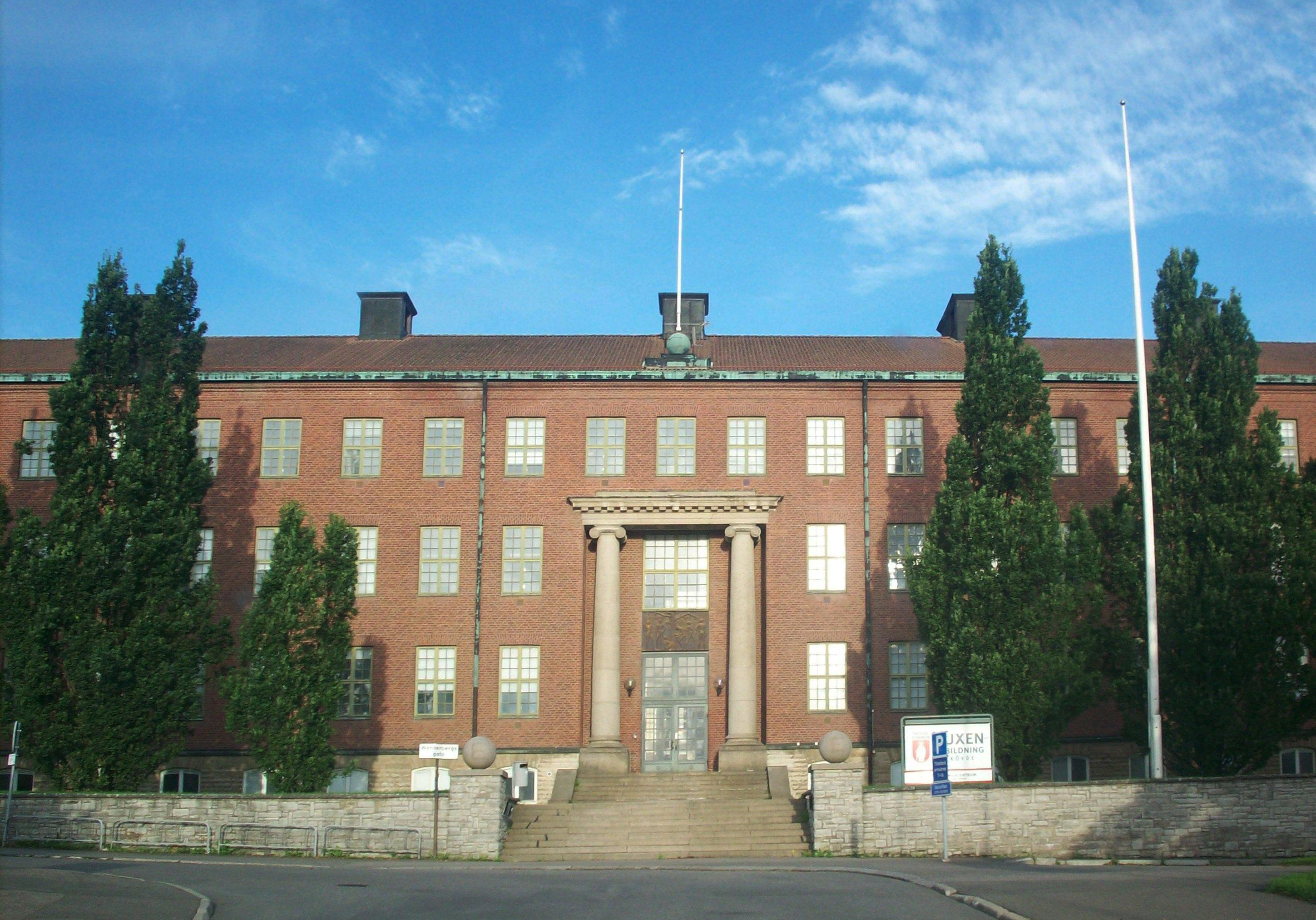 Komvux (Vuxen Utbildningen) i Skövde